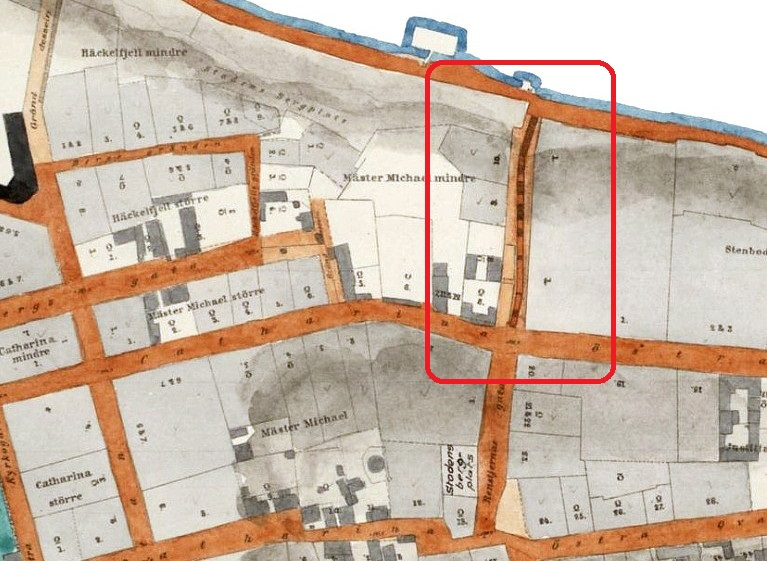 Karta över Katarinaberget och Stigberget på Södermalm med Söderbergs trappor.